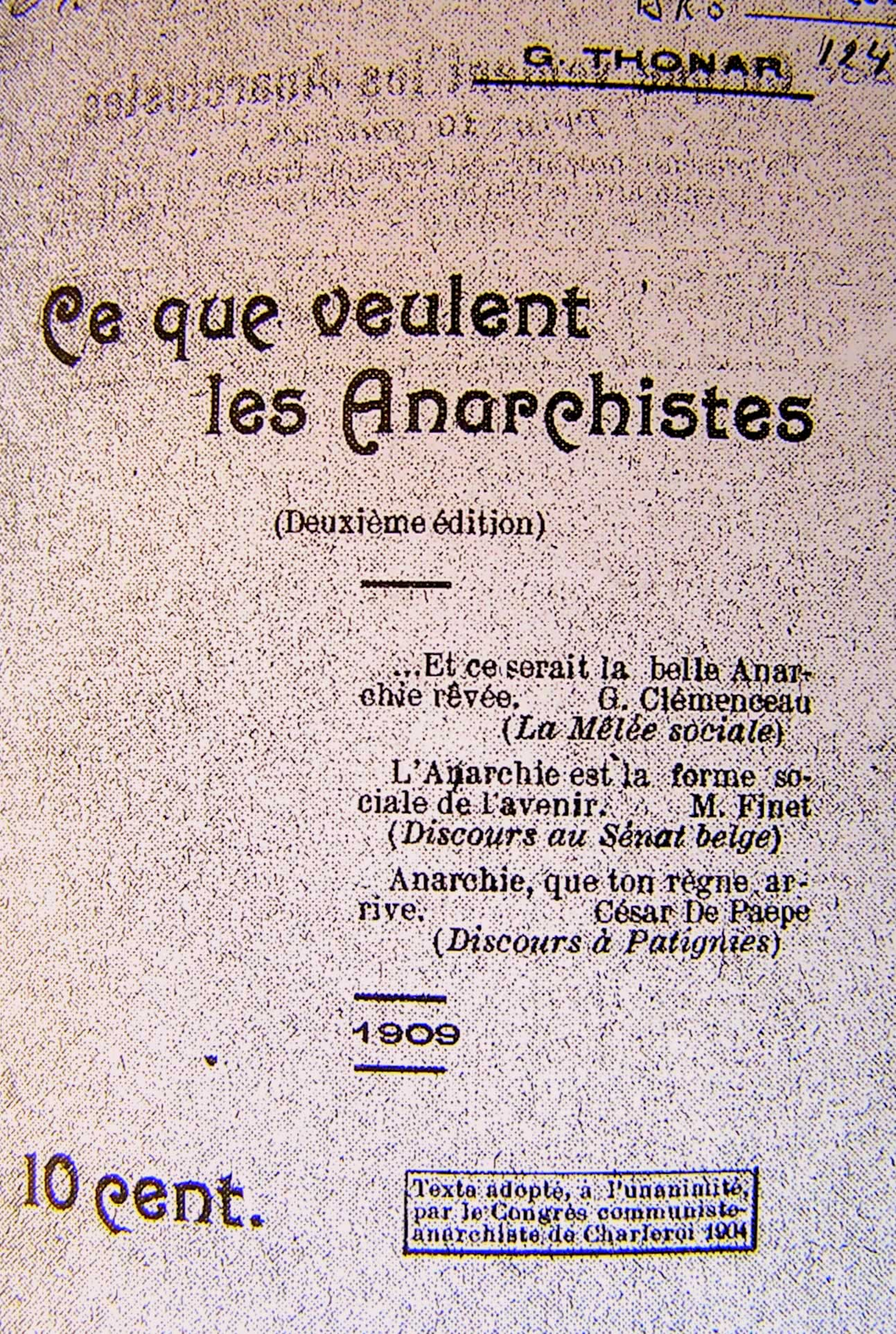 Georges Thonar - Ce que veulent les anarchistes, Liège, Publications de L’Insurgé, 1904 - Couverture d'une réédition de 1909.